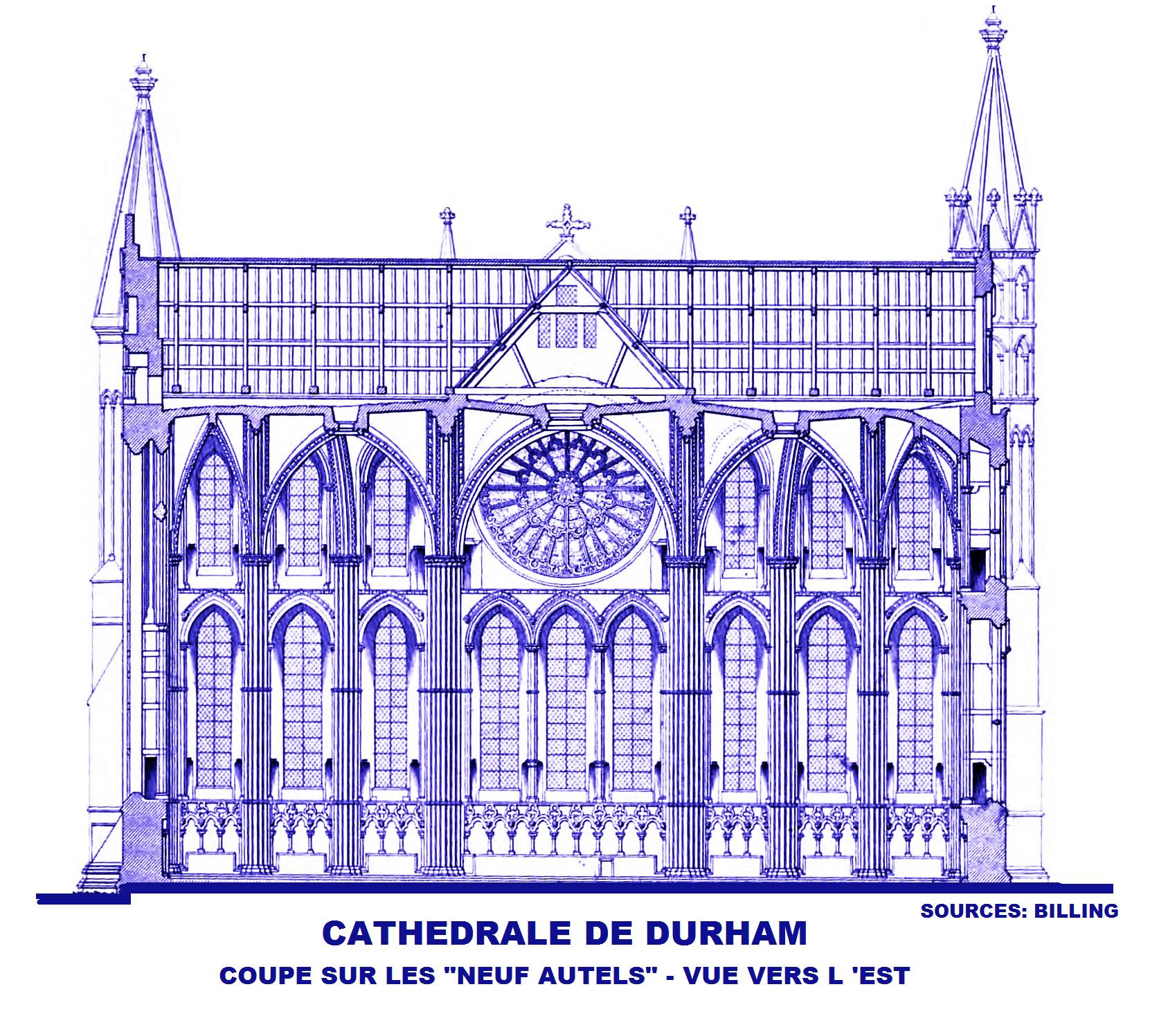 Cathédrale de Durham, Coupe sur les Neuf Autels (image du domaine public (Billing 1845) modifiée)